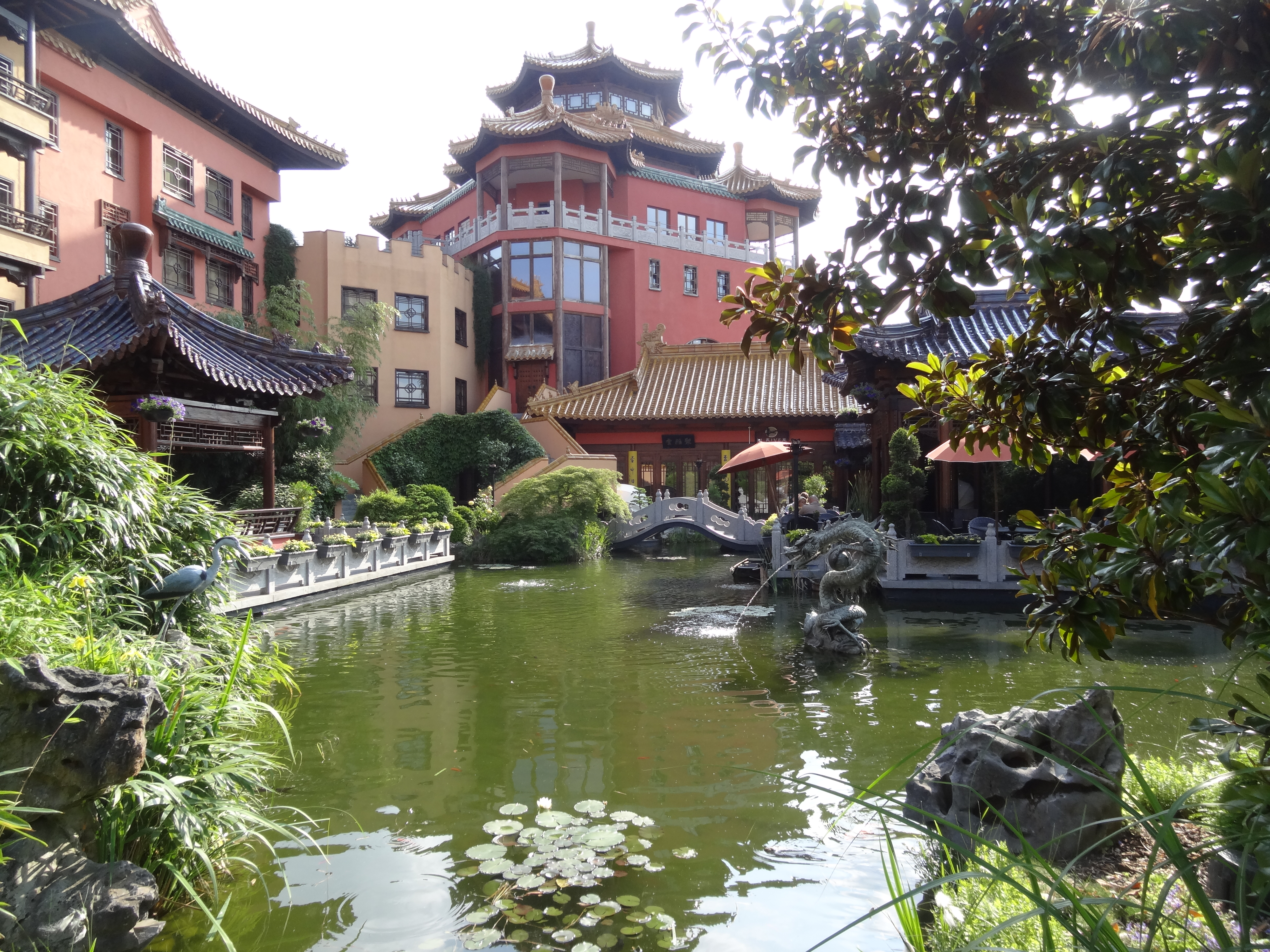 Hôtel thématique Ling Bao à Phantasialand